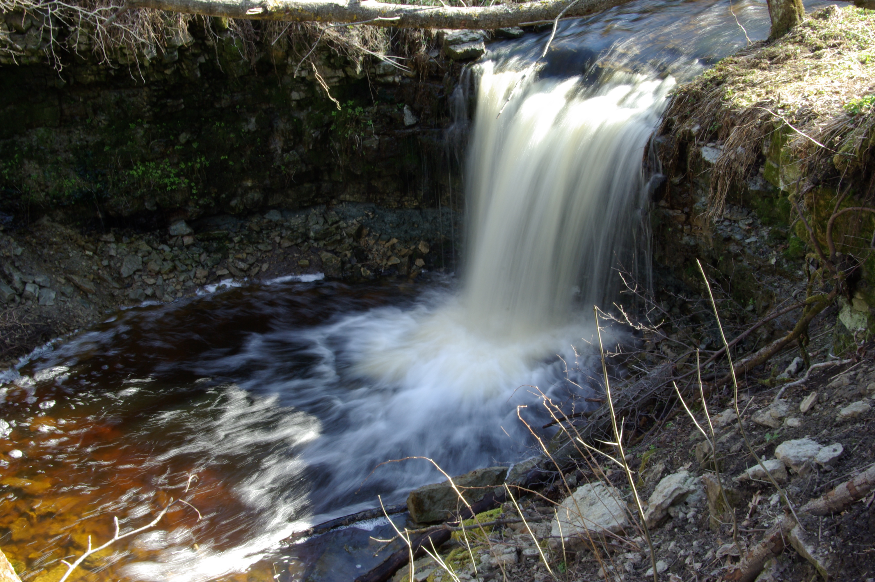 ka Padaoru juga,asub Ida-Viru maakonnas Viru-Nigula vallas Pada oru ääres